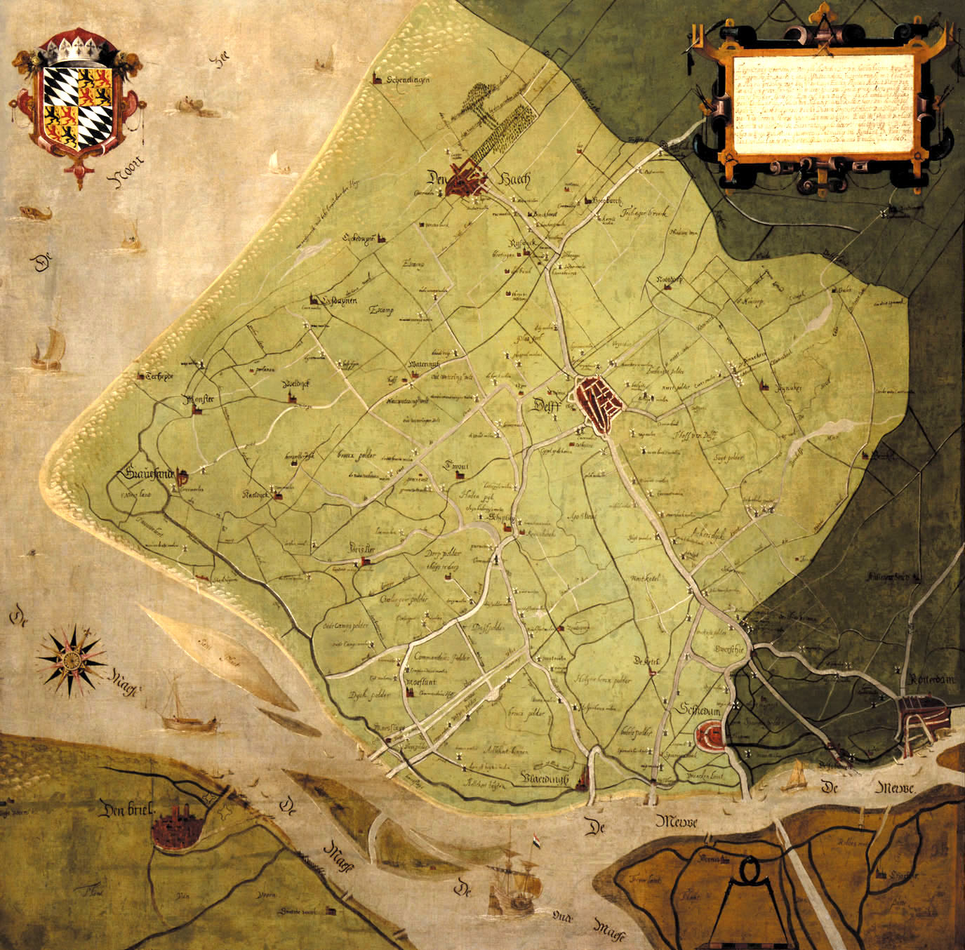 Westland, Hoogheemraadschap Delflant, overzichtskaart van Delfland door Mathijs de Been van Wena uit 1606